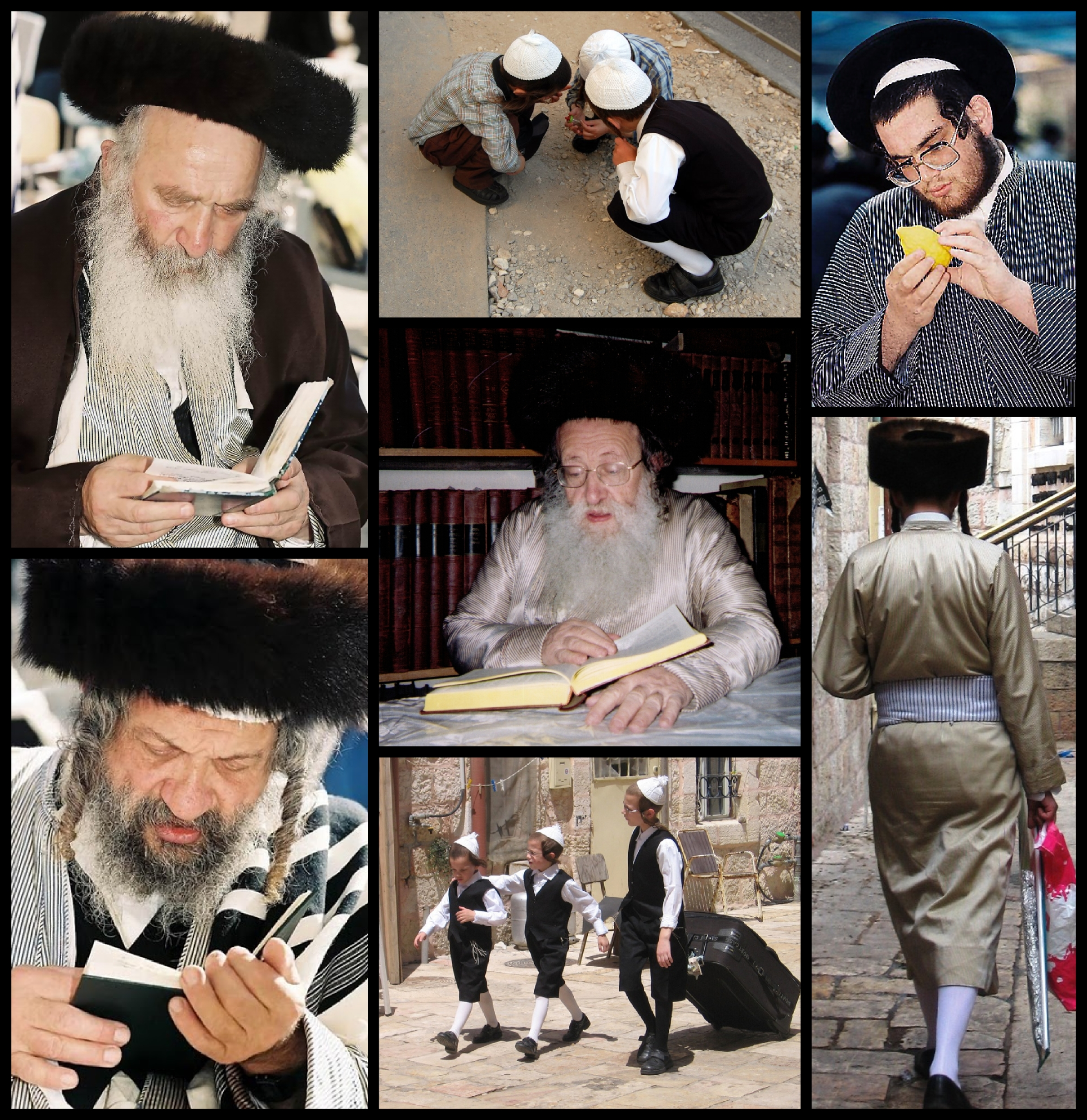 מבוסס על התמונות: file:A PORTAIT OF A REBBE AT PRAYER 9.jpg file:Kipa levana.JPG file:CHECKING AN ETROG IN MEA SHEARIM.jpg file:ירושלים 7.10.09 052.jpg file:RECITING PSALMS.jpg file:ירושלים 7.10.09 082.jpg file:Breslov kids prepare for Shabbat, Mea Shearim, Jerusalem.jpg